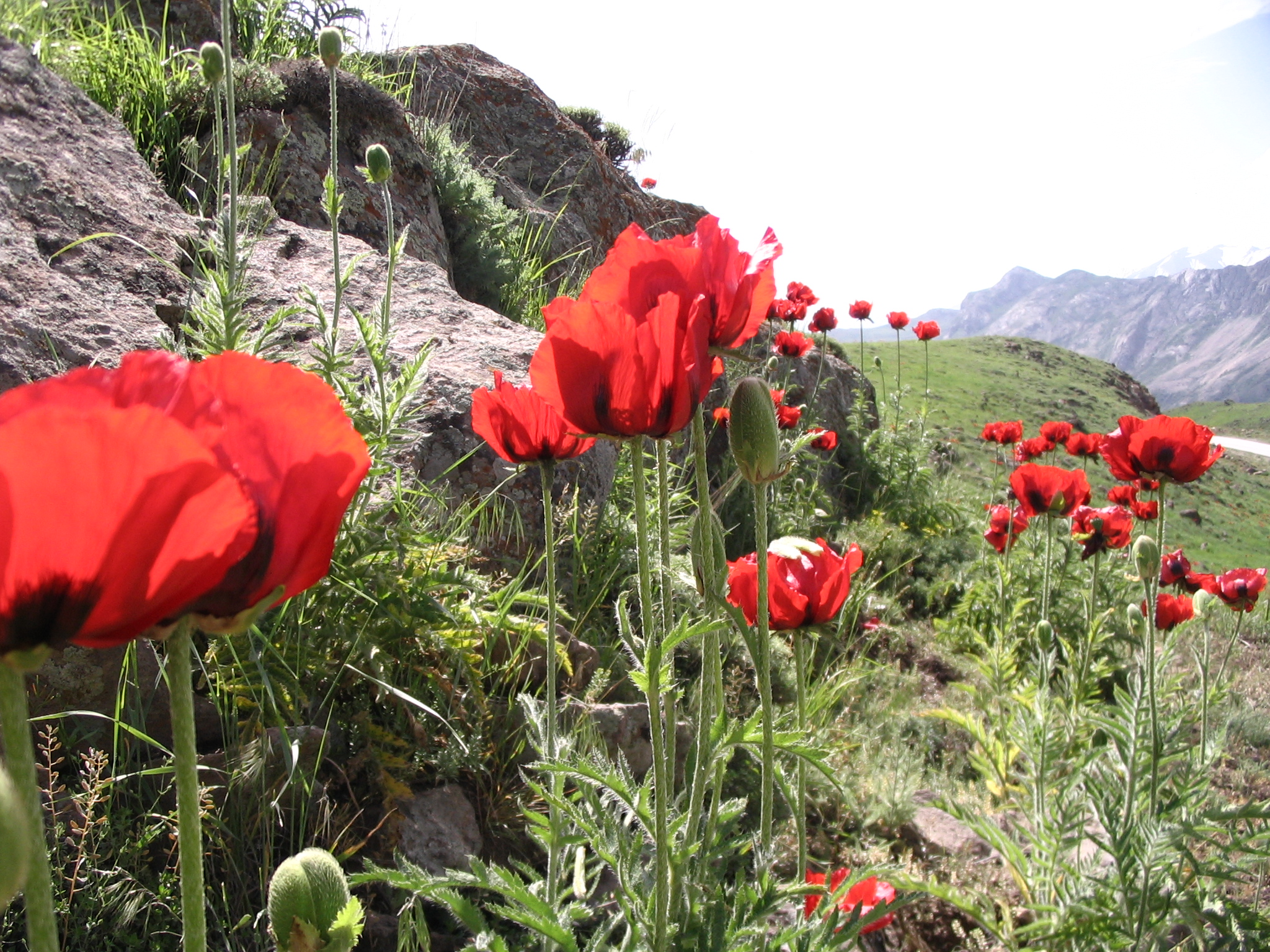 جاده پلور به وینه